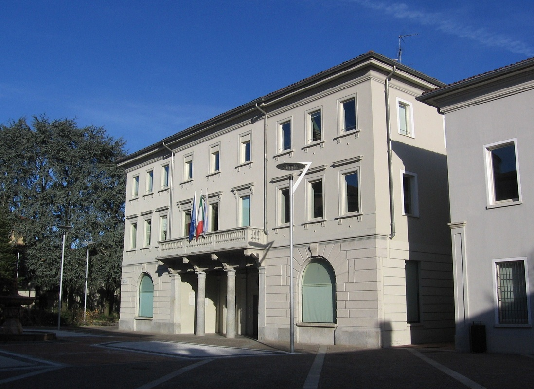 Palazzo Landriani-Caponaghi, Seregno